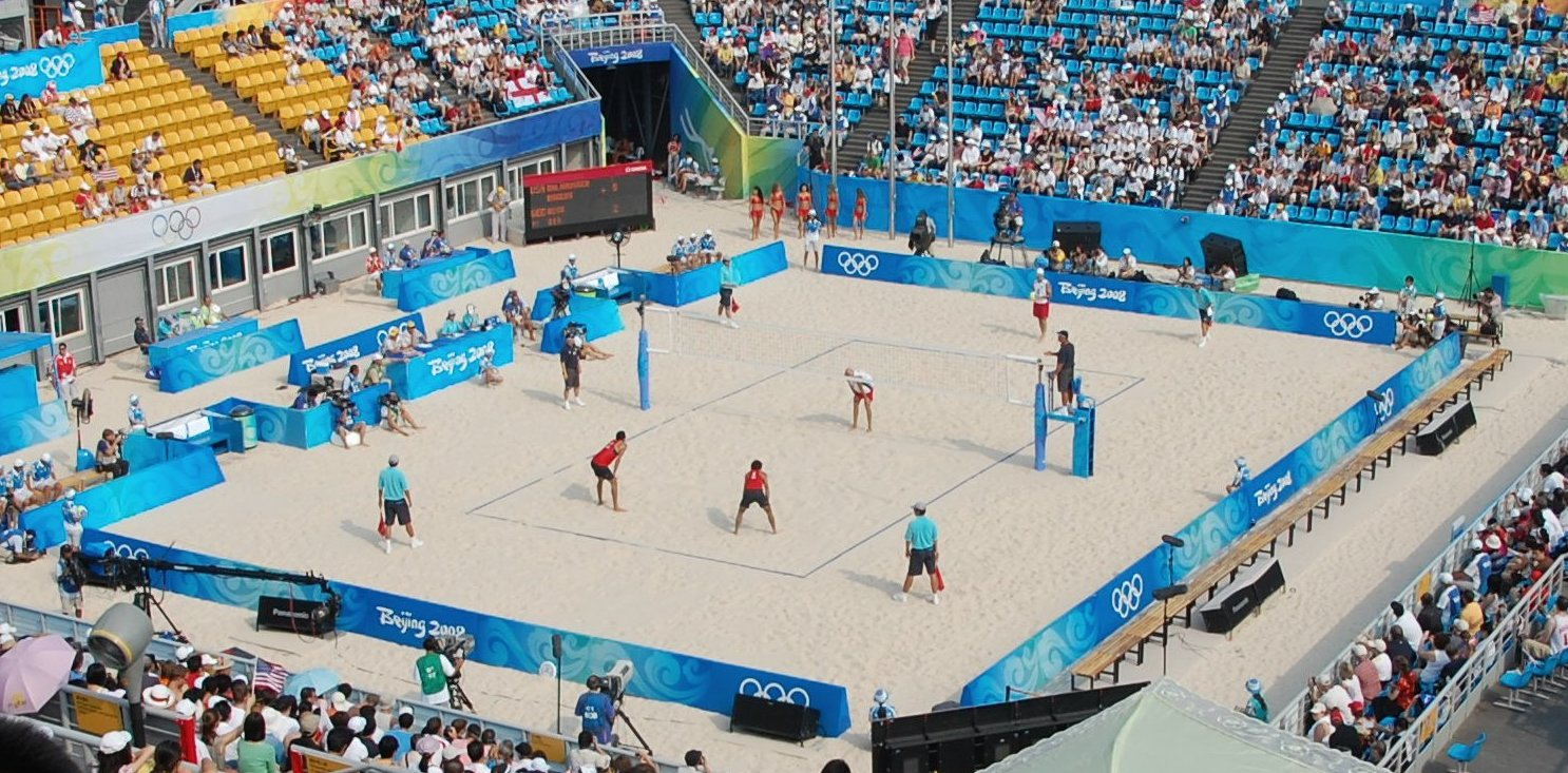 Beach Volleyball Stadium